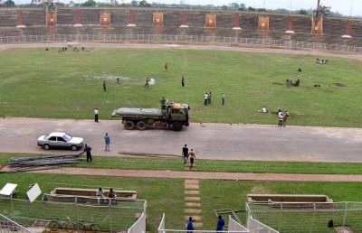 source : photo personnelle